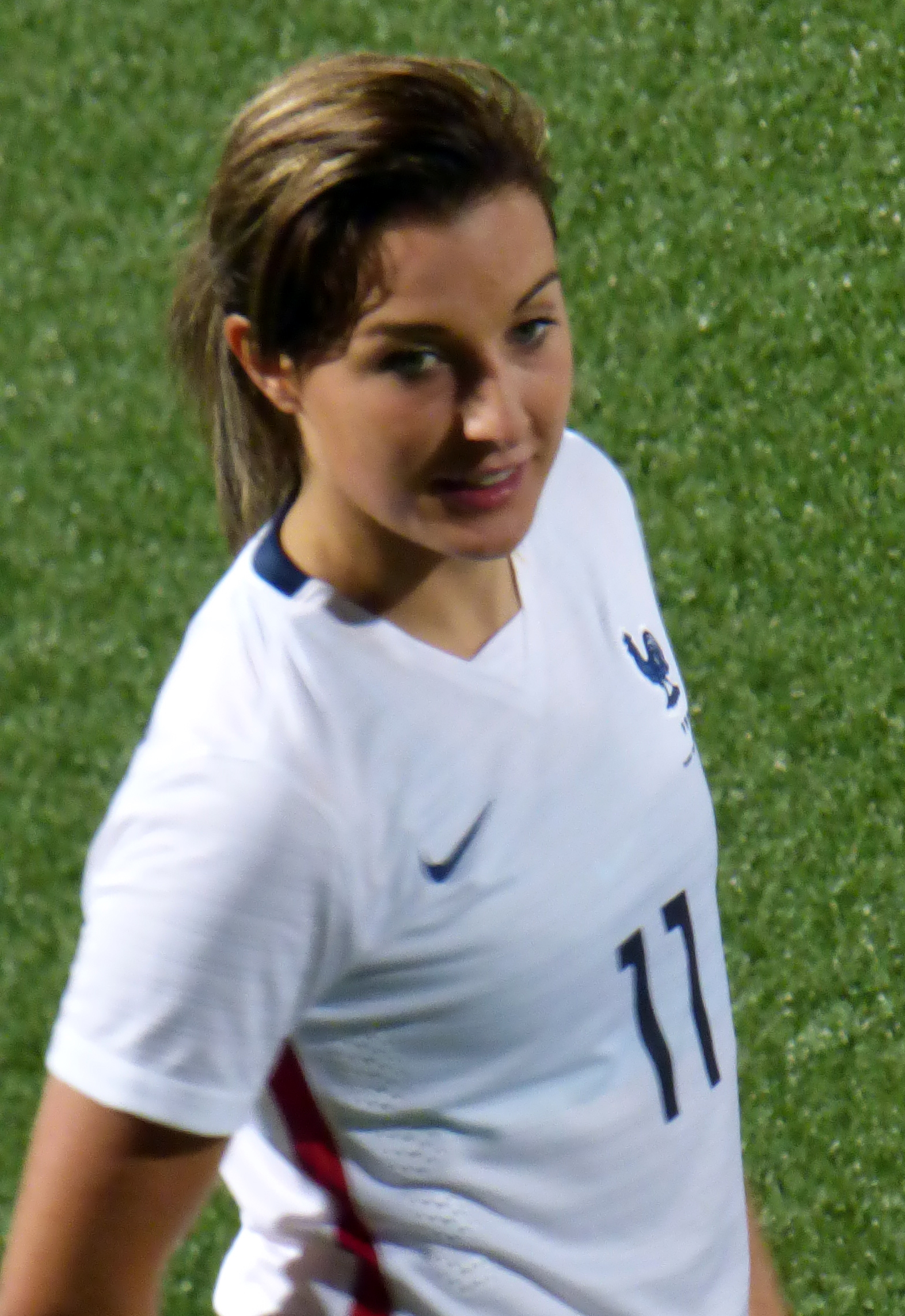 Claire Lavogez (11) and Marie-Laure Delie (18)